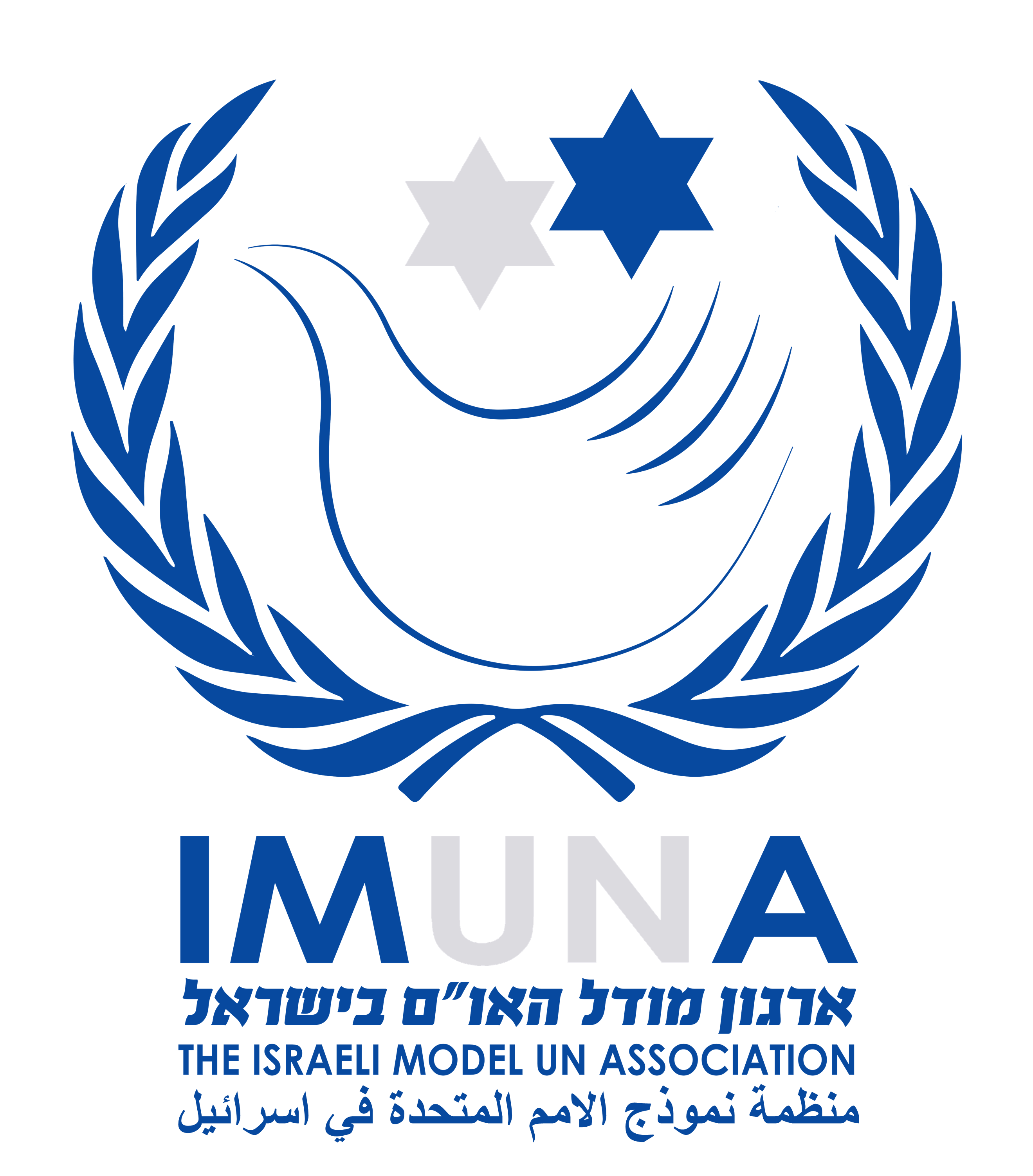 ארגון מודל האו"ם בישראל